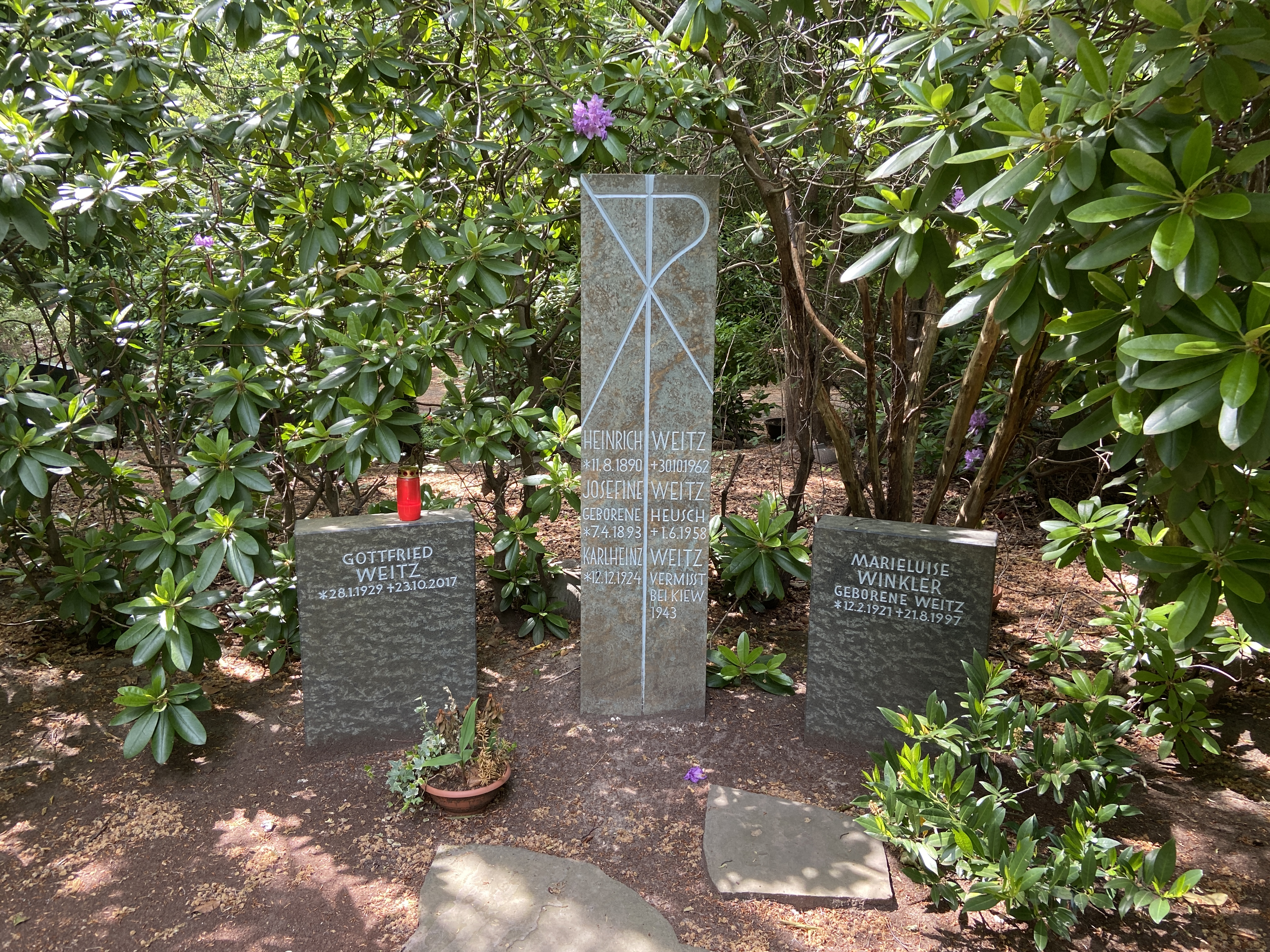 Grabstelle des Duisburgers Heinrich Weitz